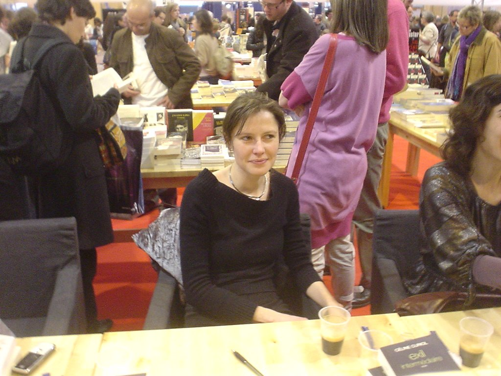 Céline Curiol au Salon du Livre à Paris en 2010.